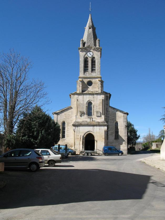 Village de Vagnas (Ardèche)